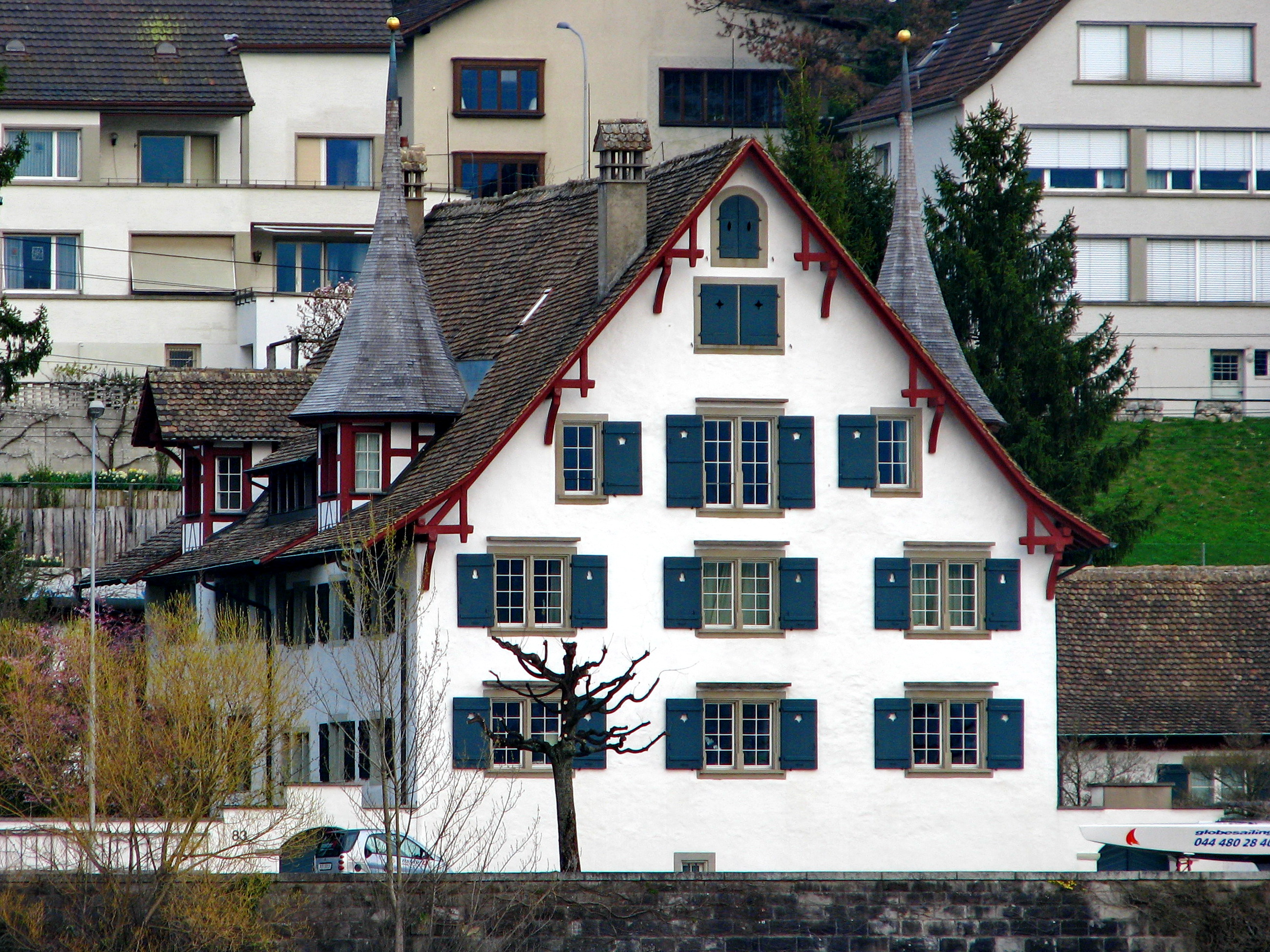 «Zum Trubenberg» in Zollikon as seen from Zürichsee (Lake Zürich)